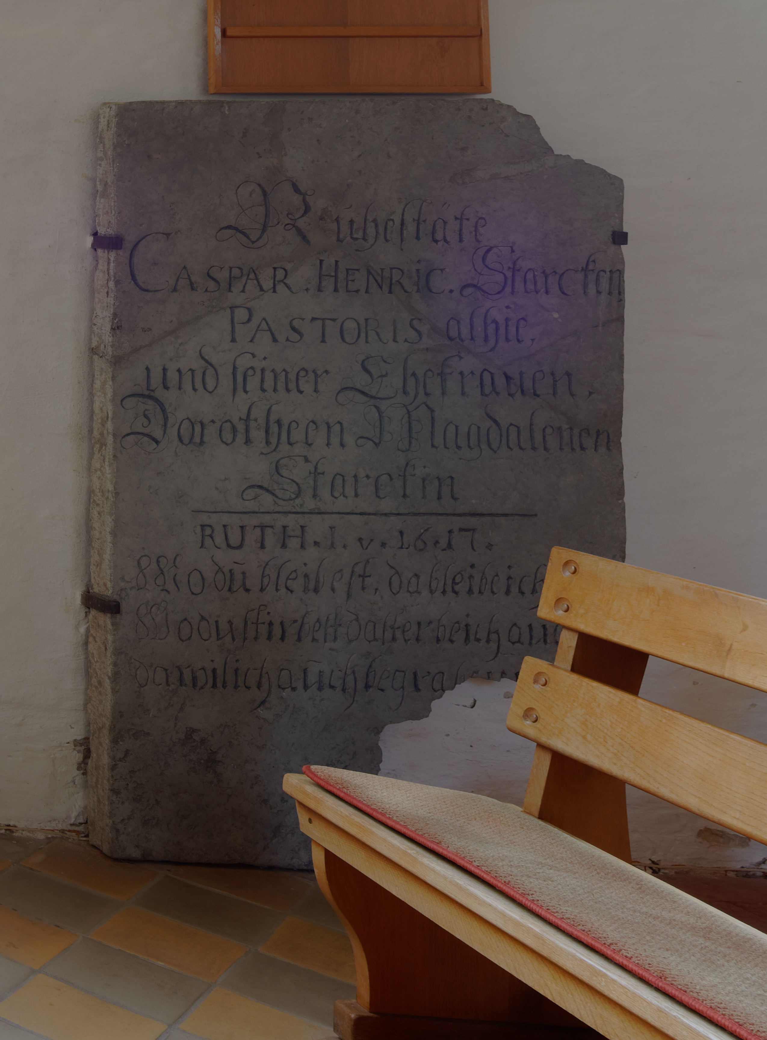 Kirche St. Marien in Siebenbäumen, Innenraum, Grabplatte